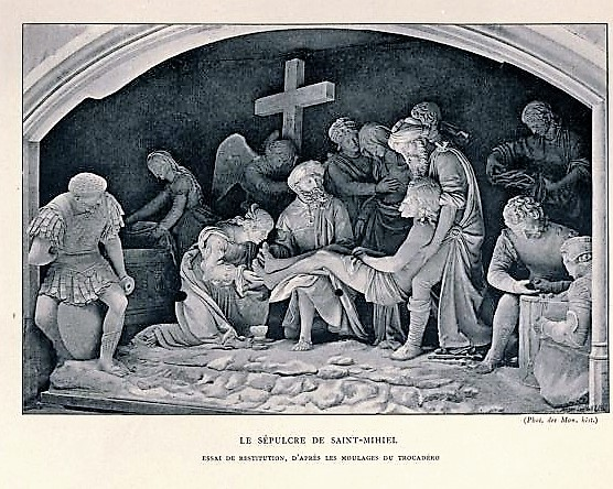 Le sépulcre de Saint-Mihiel d'après les moulages du Trocadéro en 1911